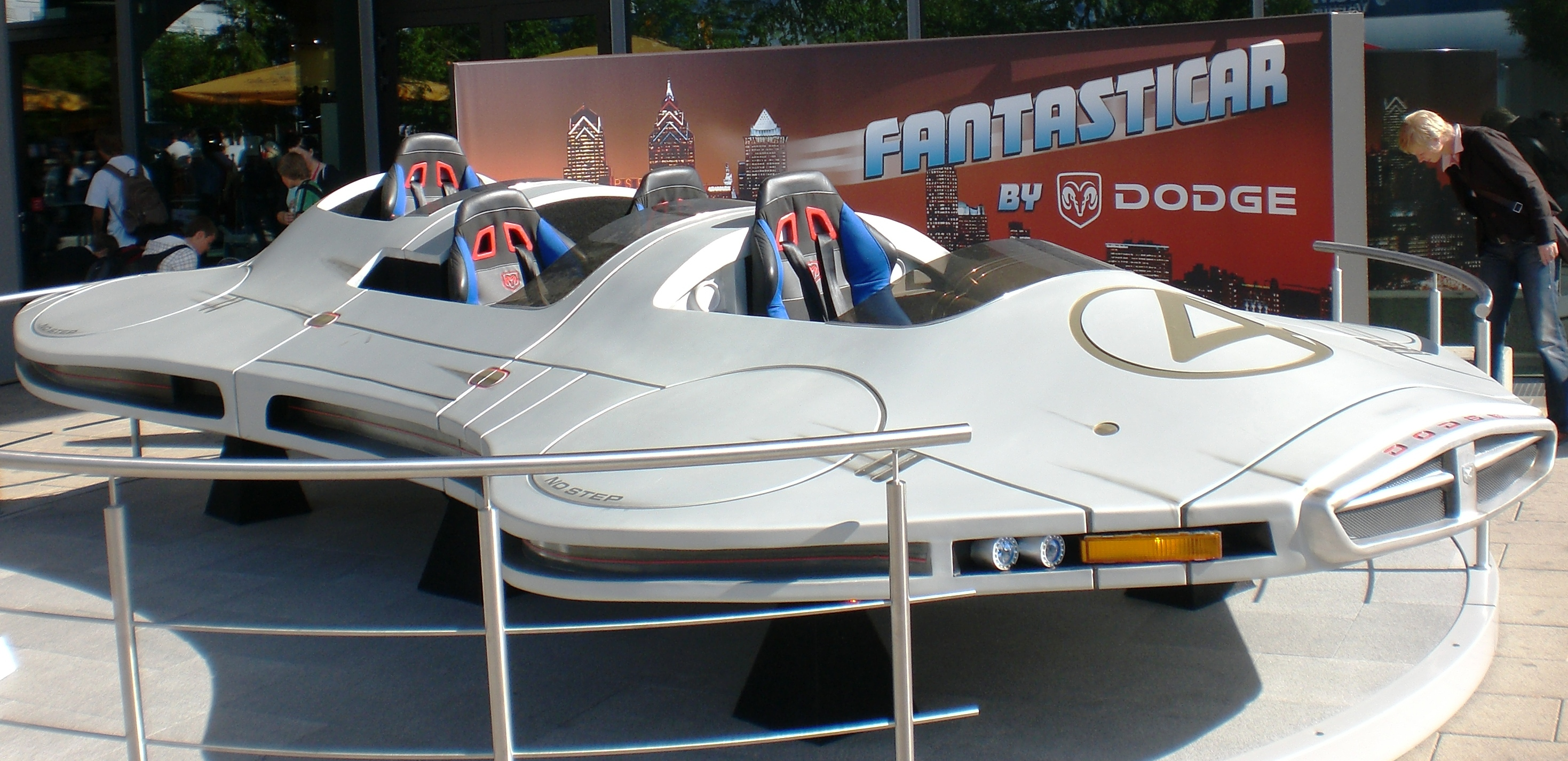 Dodge Fantasticar auf der IAA in Frankfurt